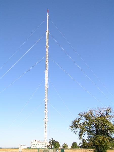 émetteur de Maisonnais, Deux-Sèvres(79), Poitou-charente, France